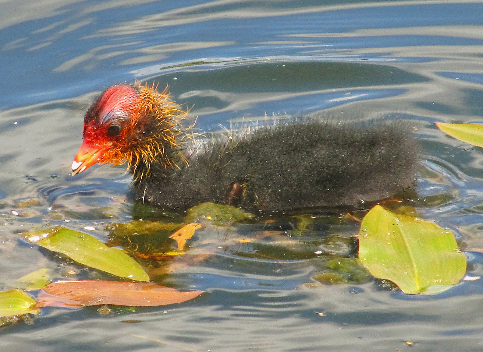 Fulica atra. Лысуха. Птенец. Неделя отроду.